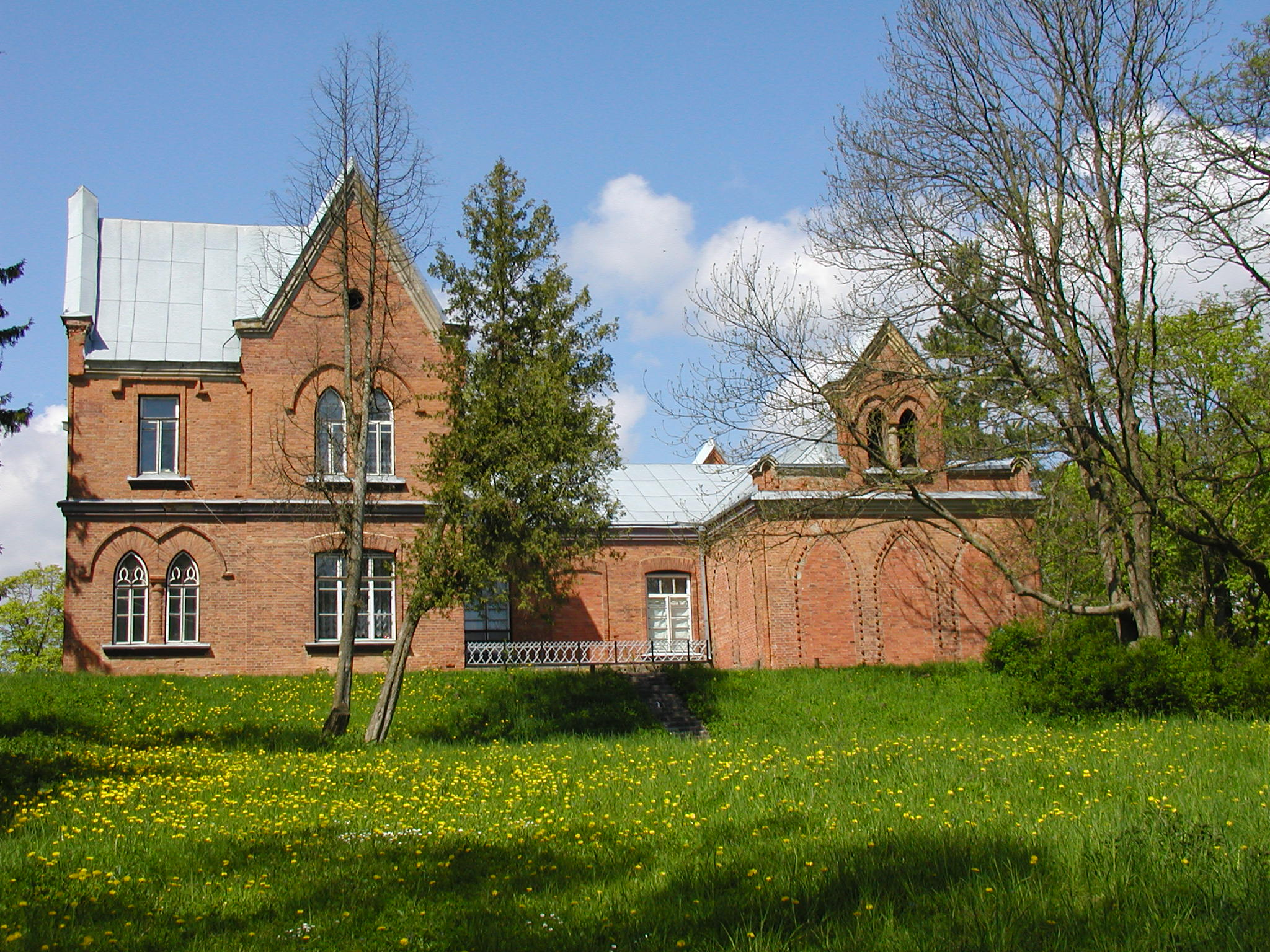 Беларуская (тарашкевіца): Фрагмэнты парку «Больцінікі». в. Больцінікі This is a photo of Belarusian heritage monument. Reference number: 412Г000126 ( WLM)